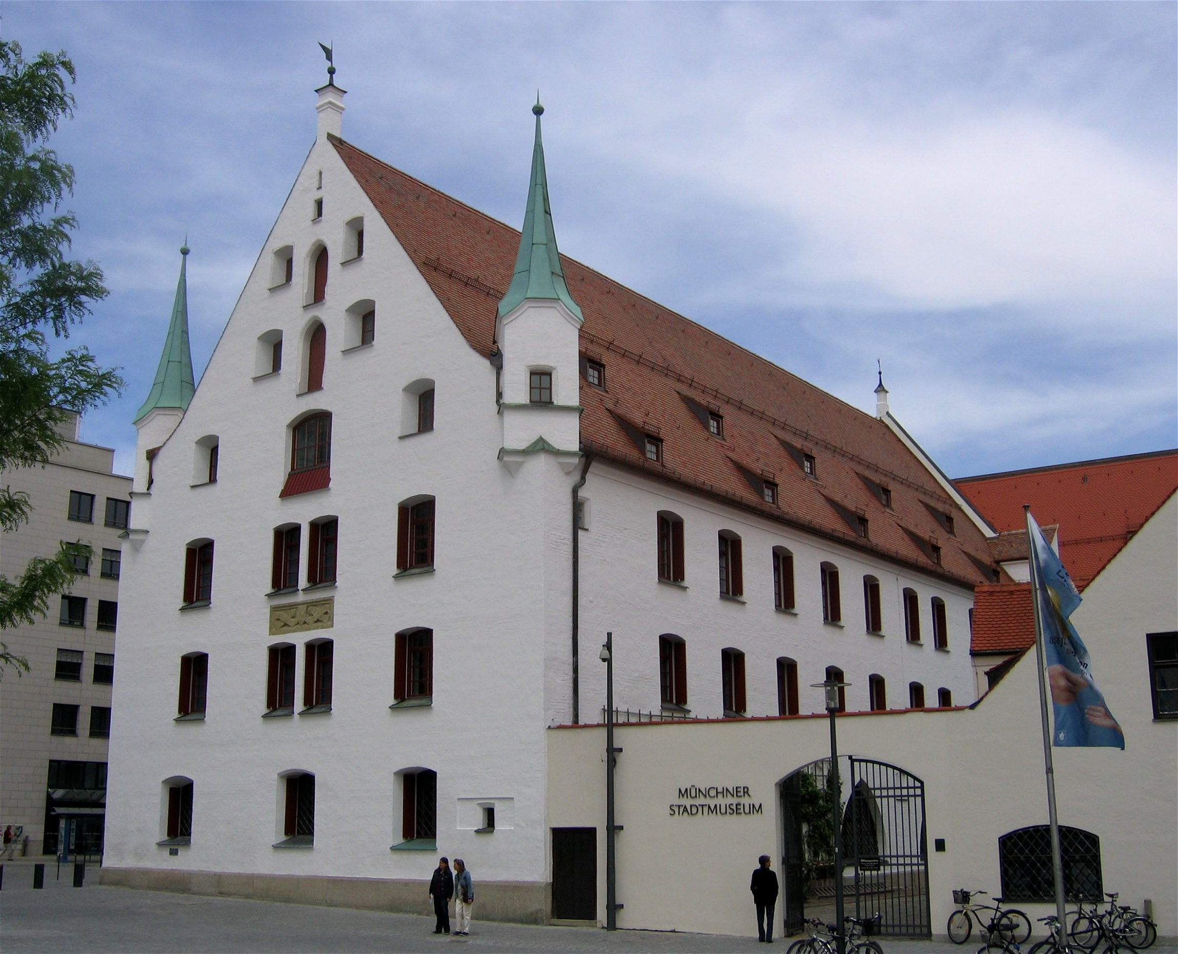 Münchener Stadtmuseum